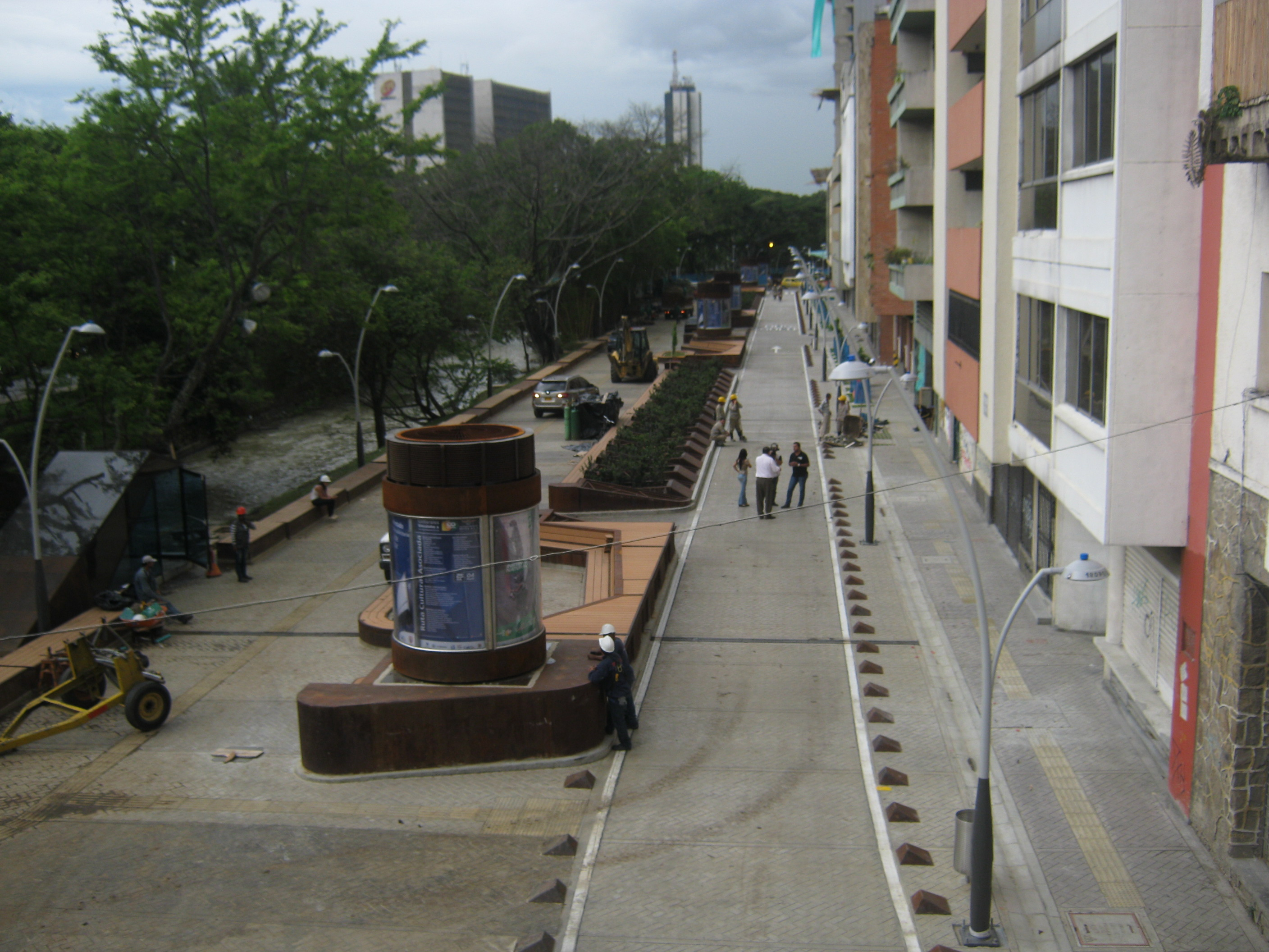 Fotos de la Avenida Colombia un día antes de su inauguración al público